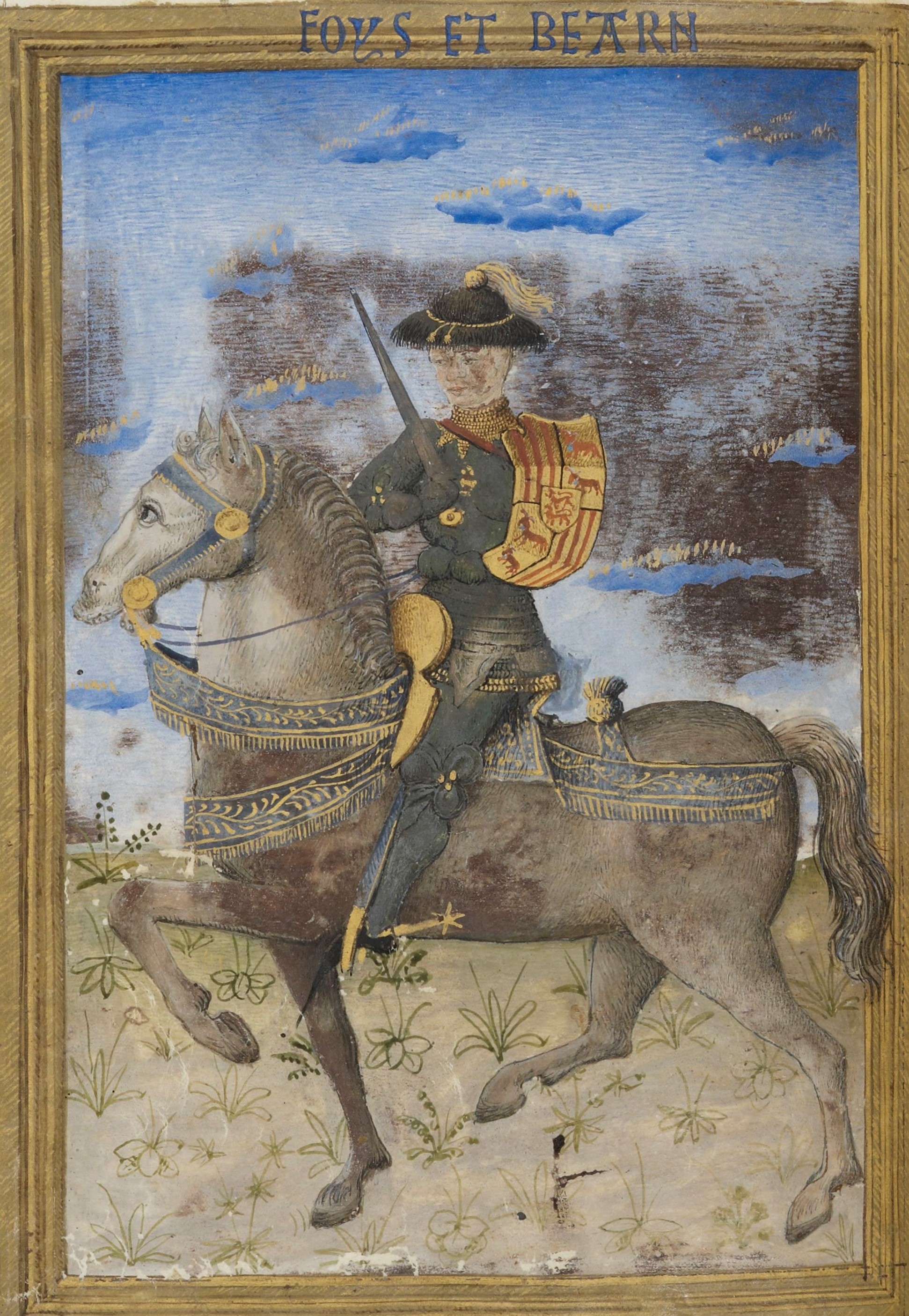 Gaston IV, comte de Foix et vicomte de Béarn, miniature tirée de l'Armorial de Gilles Le Bouvier